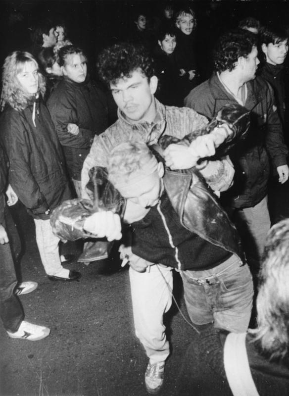 ADN-Robert Roeske-24.9.1990/Berlin: Streiflichter vom Herbst '89/ „Geprügelt für das Wohl des Volkes …“ Tausende waren am Abend des 7. Oktober 1989 in Ostberlin auf die Straße gegangen, um demokratische Grundrechte einzufordern. Die DDR-Führung setzte ihr pervertiertes Demokratie-Verständnis entgegen und ließ uniformierte und zivilie „Ordnungshüter“ aufmarschieren, die – wie hier an der DimitroffsStraße/Ecke Prenzlauer Allee – massiv gegen die Demonstranten vorgingen.